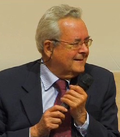 Christian Goudineau, historien et archéologue français, professeur au Collège de France